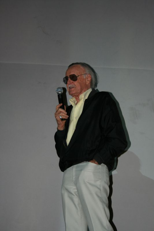 Stan Lee